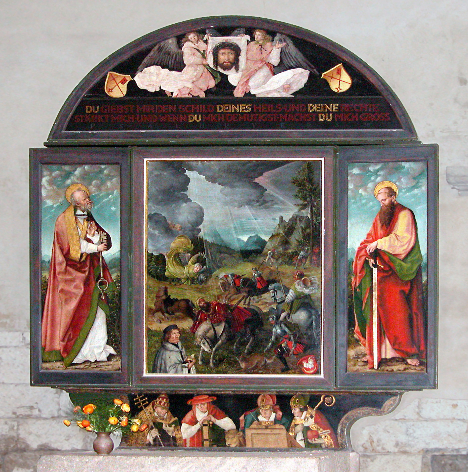 03.05.2004 06618 Naumburg: Dom, spätromanisch-frühgotisch. 1. Weihe 1042, später oft verändert. Flügelaltar im Nordquerhaus mit der Bekehrung des Paulus, 1520 von Georg Lemberger. [DSCN3229.JPG]20040503490DR.JPG(c)Blobelt